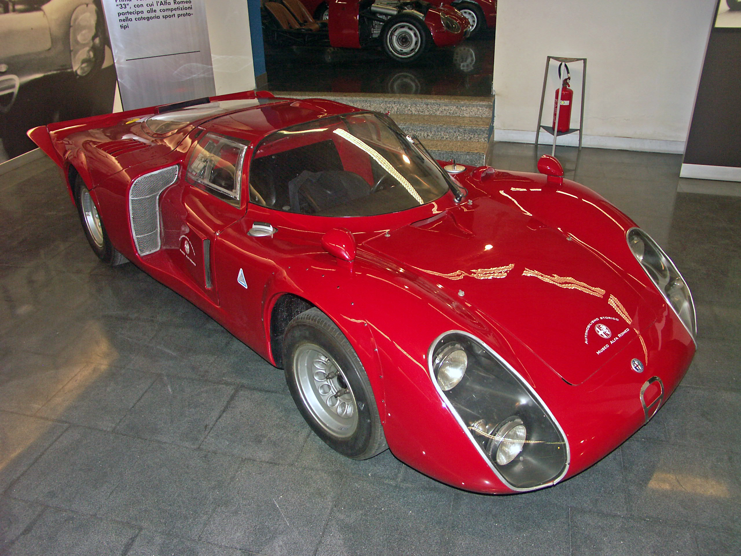 Alfa Romeo Tipo 33-2 Daytona Coupe